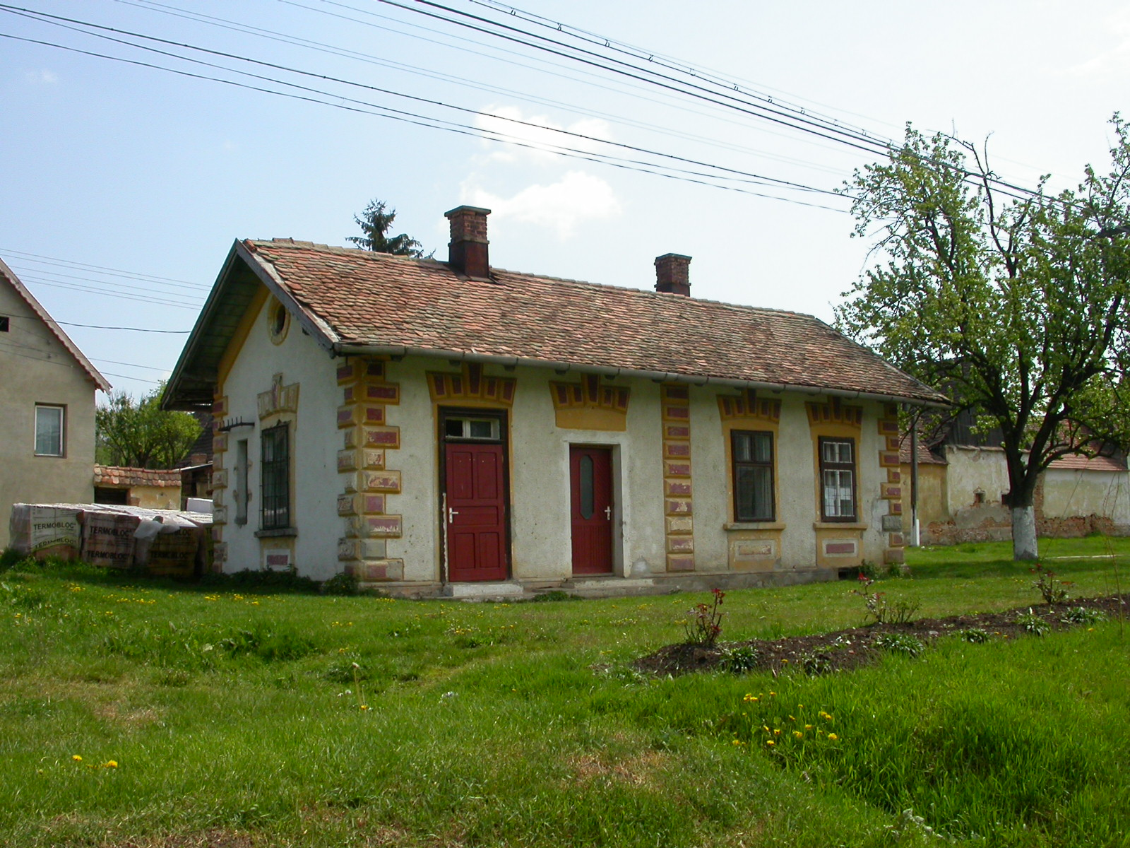 Halta Șaeș, sf. sec. XIX 04